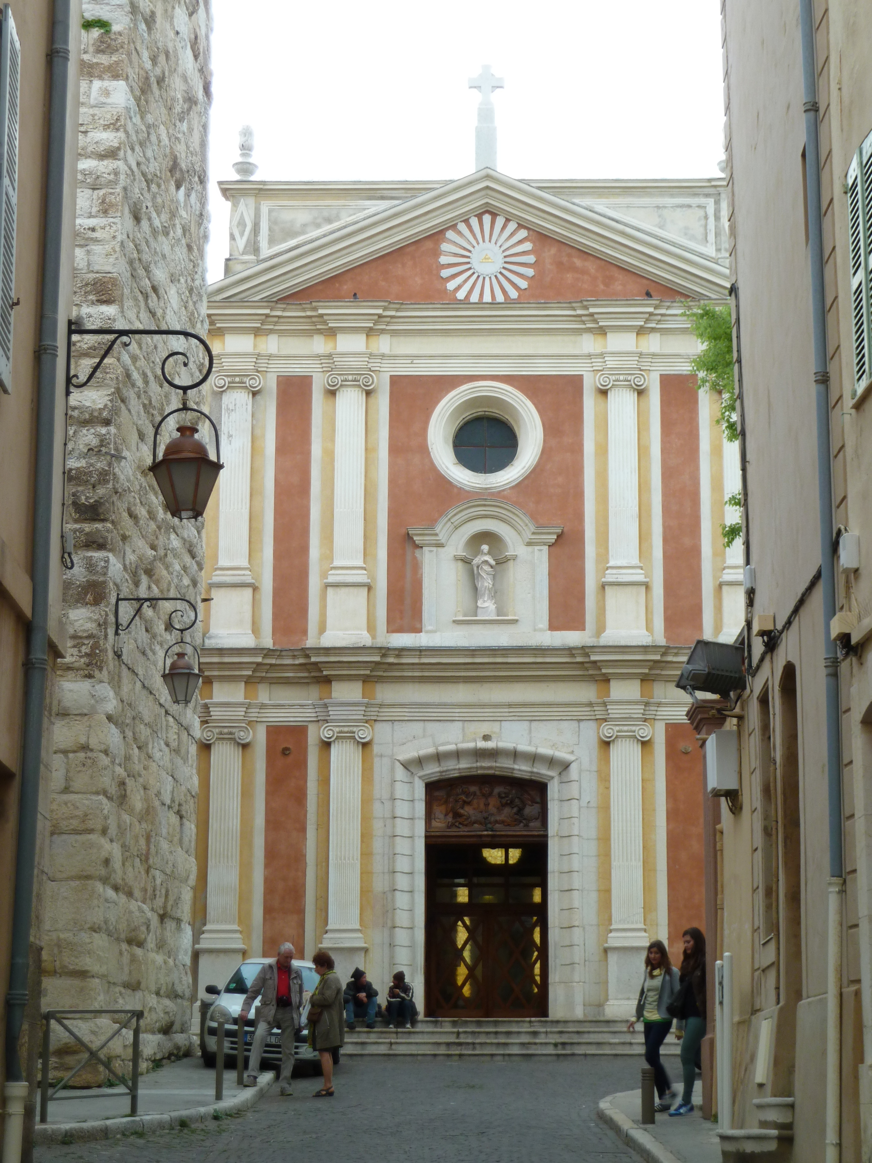 cathédrale antibes